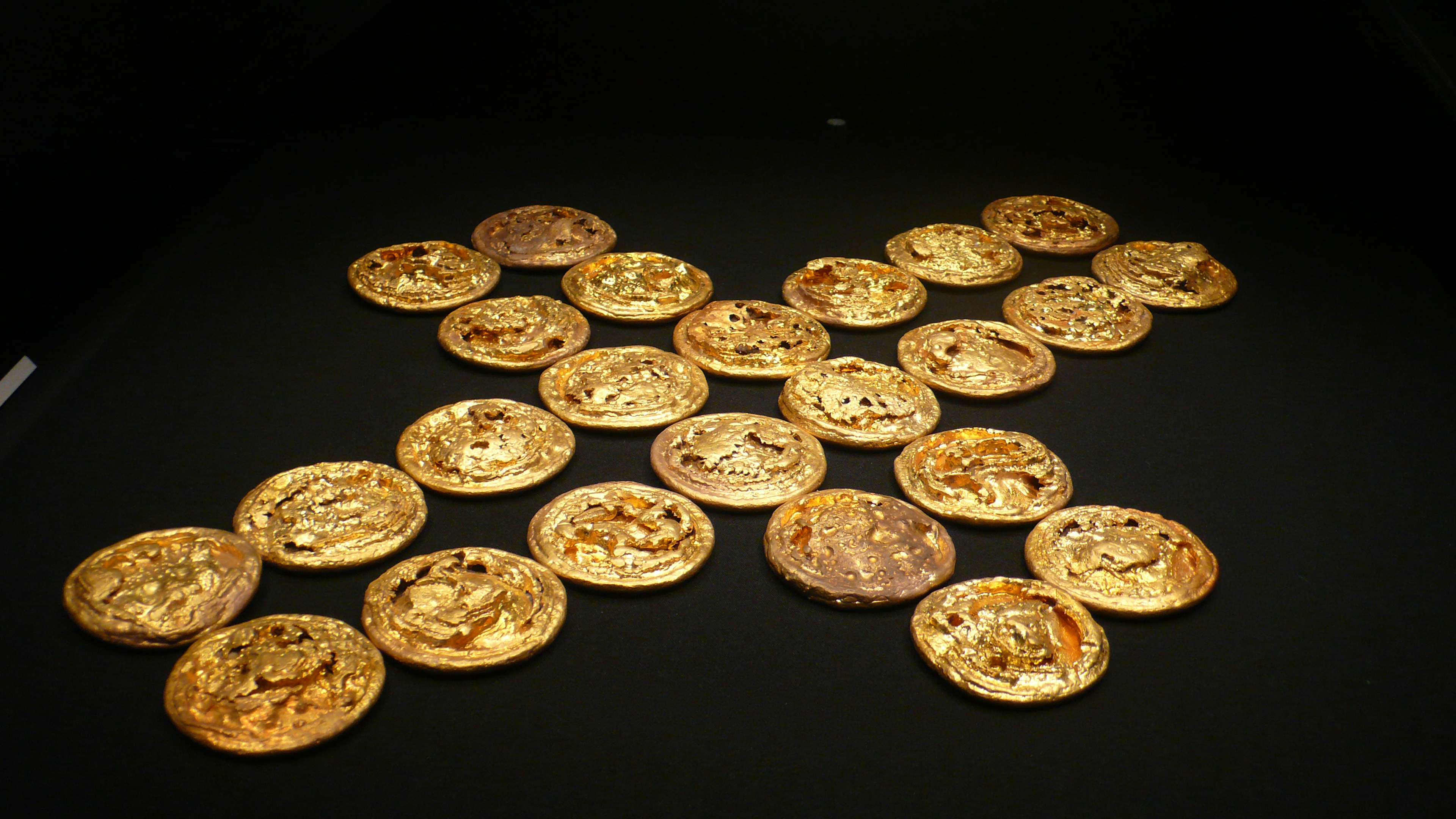 金饼 。海昏侯国遗址出土。首都博物馆临展。